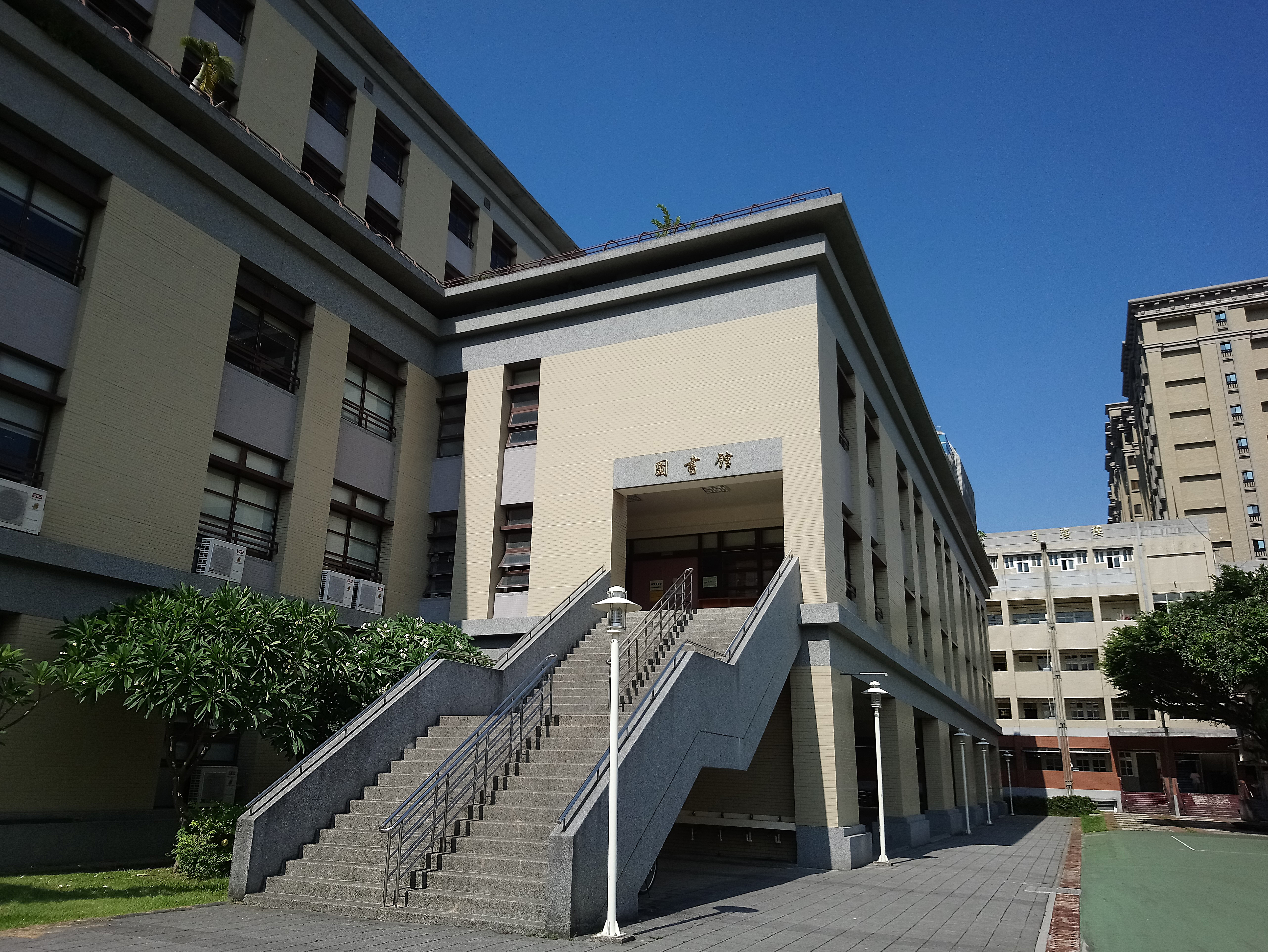 臺北市立中山女子高級中學圖書館,臺北市中山區朱厝崙次分區力行里